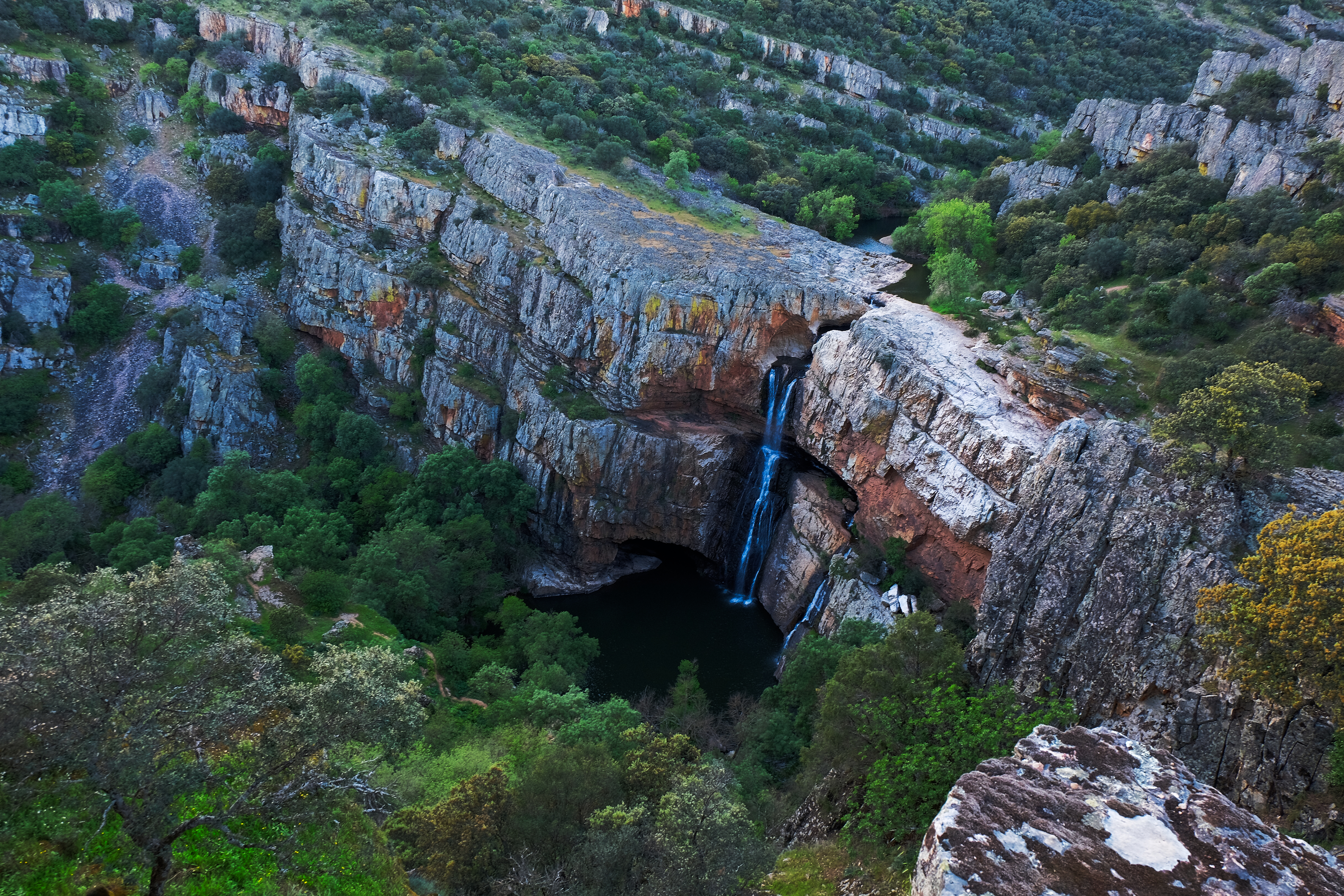 Cascada de Cimbarra This is a photography of a Site of Community Importance in Spain with the ID: ES6160003. Natura2000 entry, EEA entry